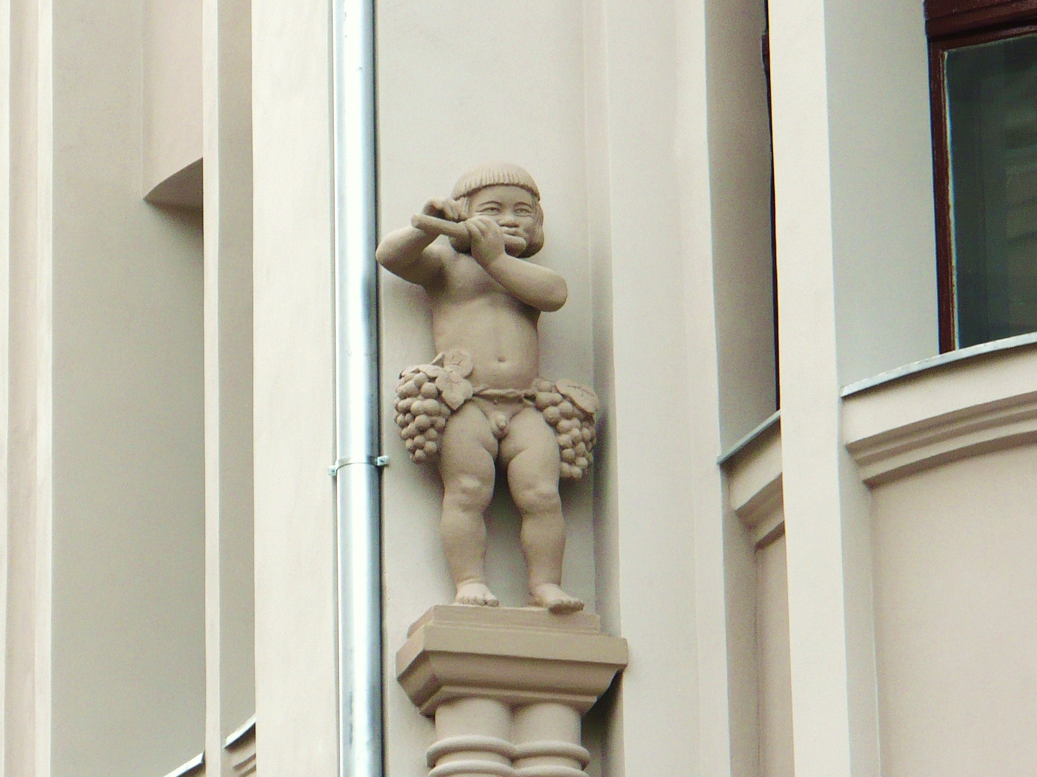 dom towarowy, 1910-1911 Bydgoszcz, ul. Gdańska 15